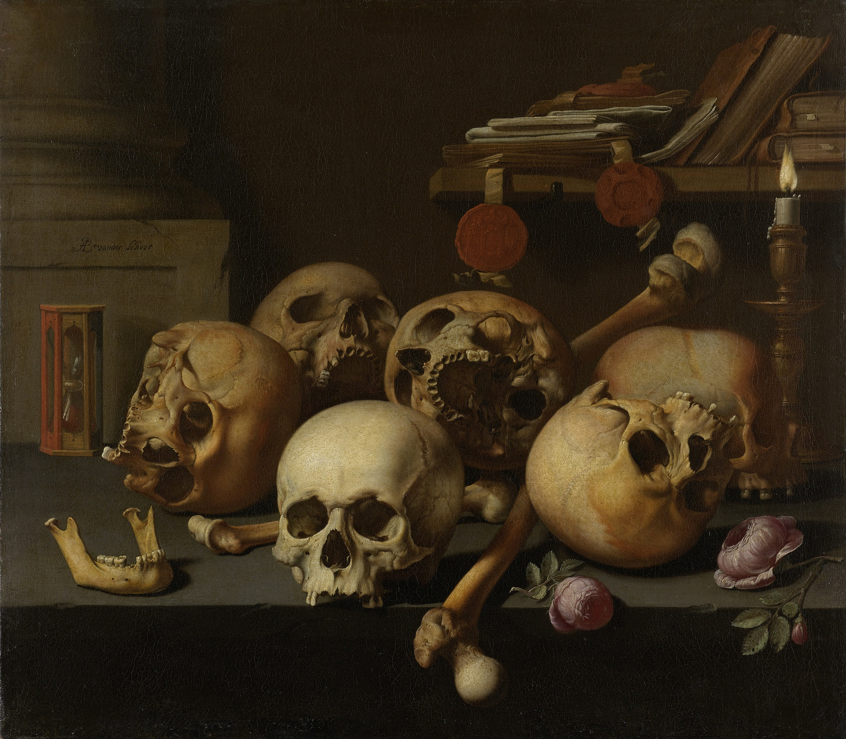 Vanitas stilleven met schedels, botten, rozen, een zandloper en een brandende kaars op een stenen tafel of plint. Tegen de muur een plankje met documenten met zegels en boeken.